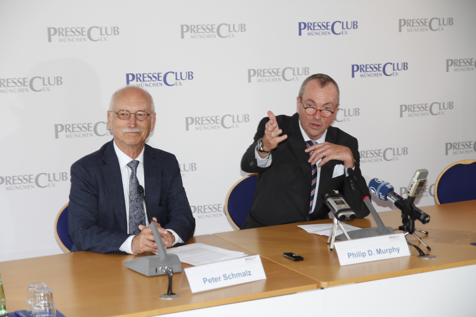 Peter Schmalz und Philip D. Murphy im PresseClub München 2013